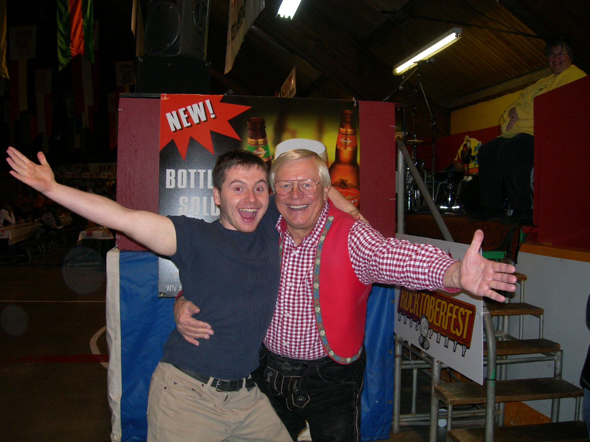 Walter Ostanek, Canada's Polka king at Oktoberfest in Kitchener 2006.